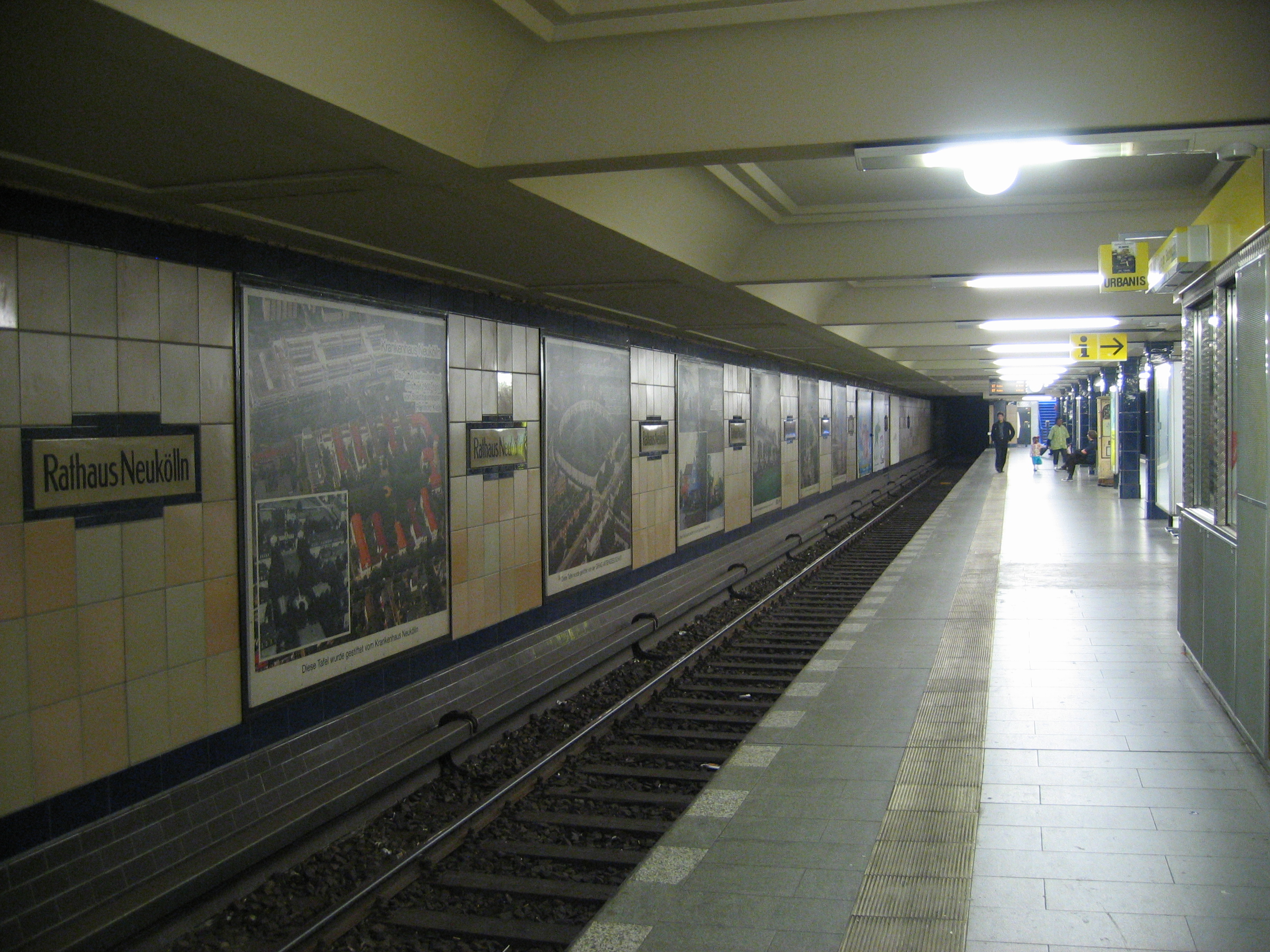 U-Bahnhof Rathaus Neukölln, Berlin